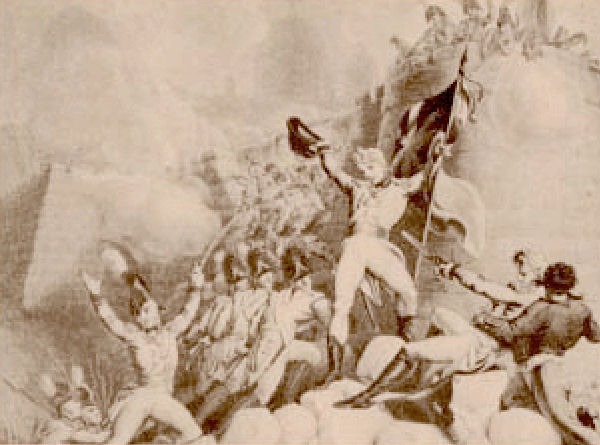 Detalle de la obra "Asalto de los Ingleses a la brecha de la Ciudadela" del artista E. F. Burney. Toma de la Ciudad de Montevideo el 3 de febrero de 1807, durante las Invasiones Inglesas.